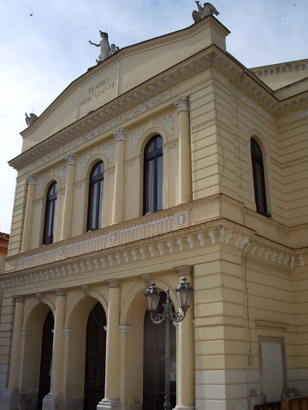 Facciata del Teatro Comunale "Saverio Mercadante" di Cerignola (FG).